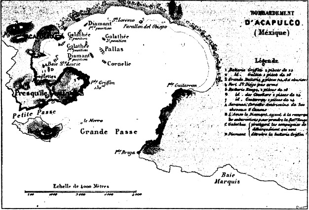 Bombardement d'Acapulco (Méxique)